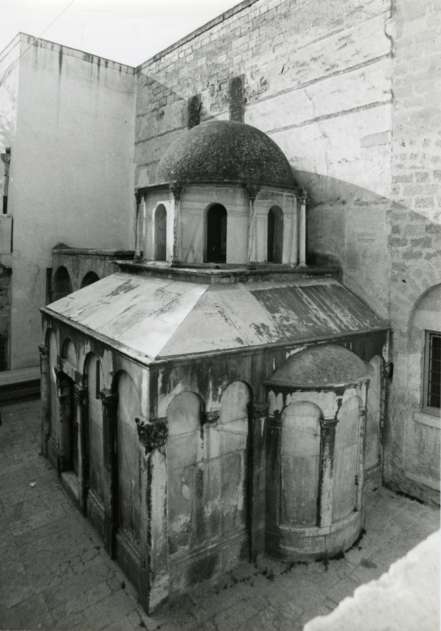 Serie fotografica : Canosa di Puglia, 1970 / Paolo Monti. - Stampe: 3 : Positivo b/n, gelatina bromuro d'argento/ carta, 24x30. - ((Al verso delle stampe manoscritto numero di negativo corrispondente: 1380, 1380/10. Sul coperchio della scatola manoscritto a pennarello nero: "Puglie/ Architettura". - Occasione: Puglia: Castelli medievali e cattedrali romaniche. Fatturate all'Istituto nazionale di Archeologia di Roma 855 riprese di Castelli di Puglia e Scultura medioevale - Bari il 27-12-1970 (04); altre 135 riprese il 23-12-1970. - Fonte: Agenda di Paolo Monti: Monti - Agenda 1970 (1970), presso Archivio Paolo Monti